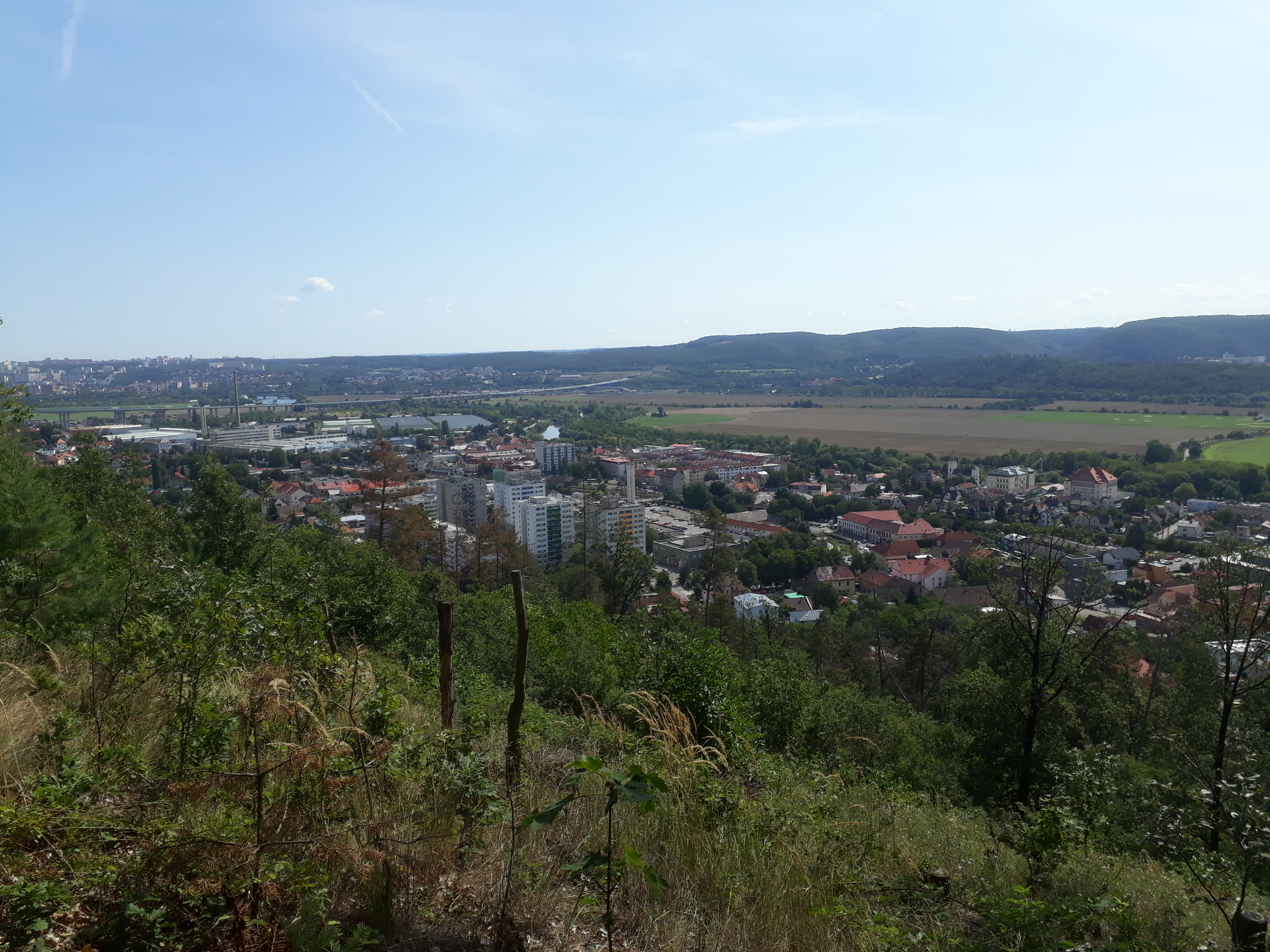 Pohled na Radotín z vrchu Klapice z roku 2019